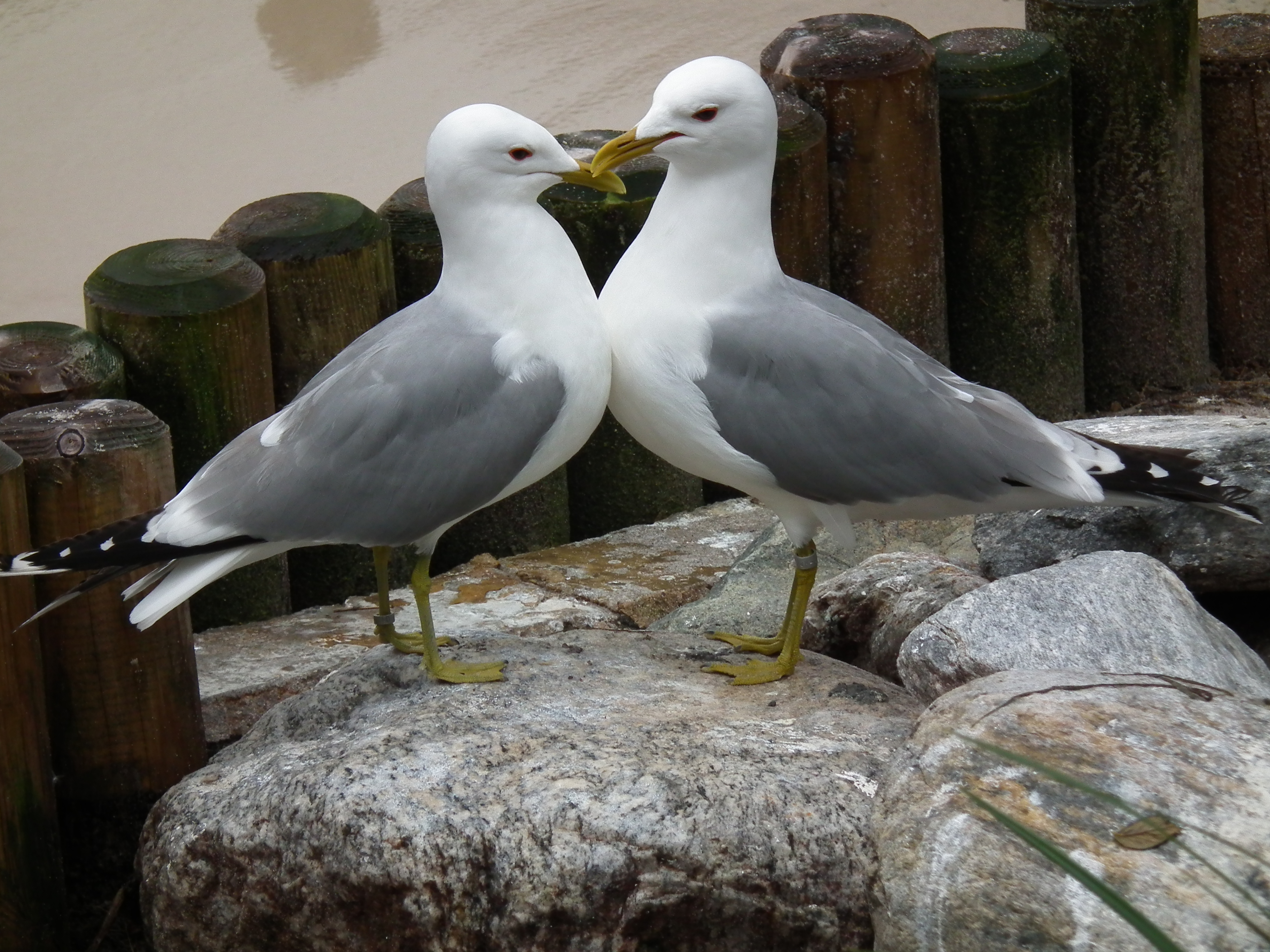 Balzende Sturmmöwen (Larus canus), fotografiert im Tiergarten Heidelberg (Baden-Württemberg, Deutschland)